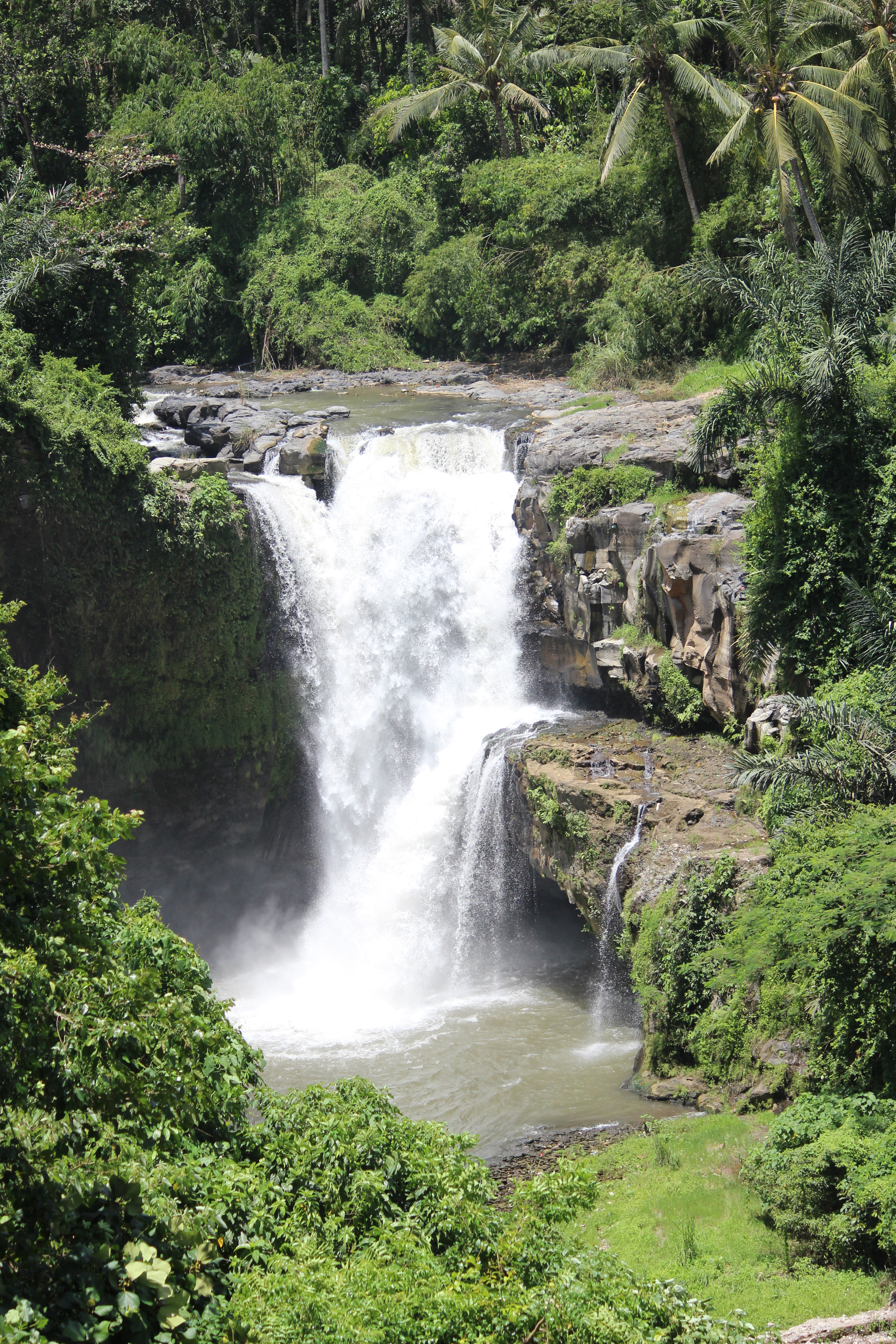 Tegenungan Waterfall Ubud Indonesia